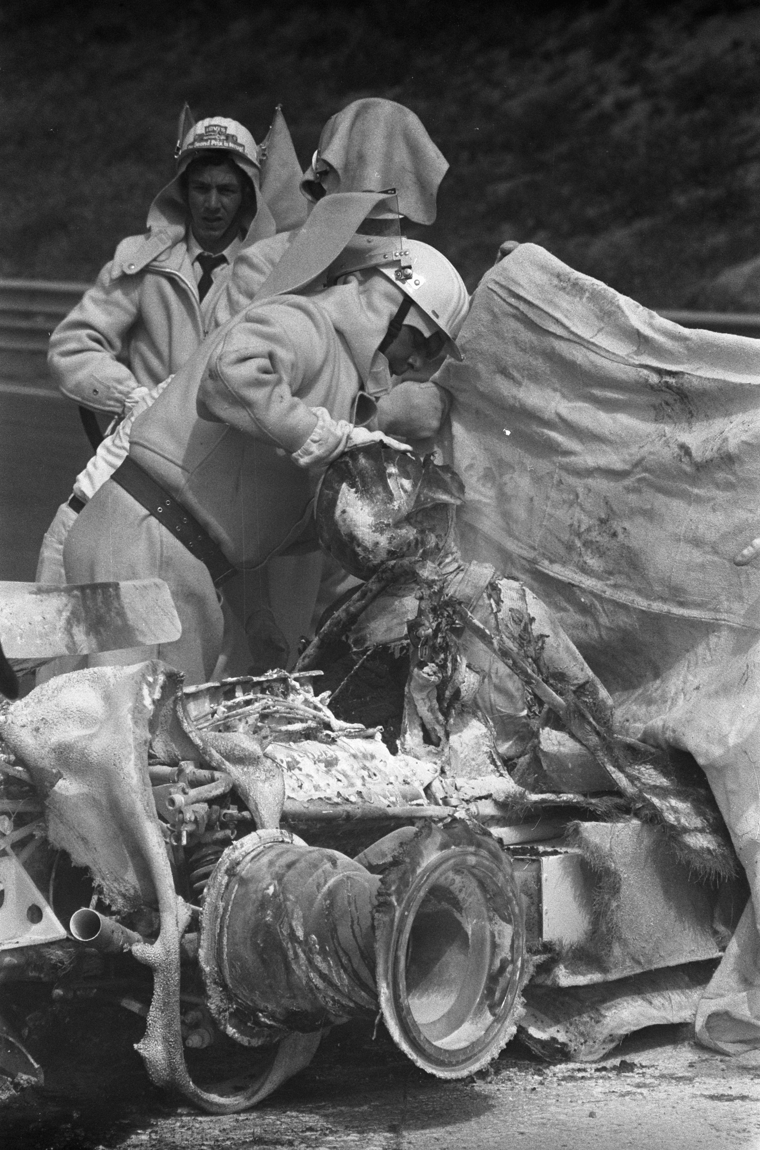 Grote Prijs van Nederland voor Formule I wagens op circuit Zandvoort, Roger Williamson verongelukt (verbrand in zijn wagen).